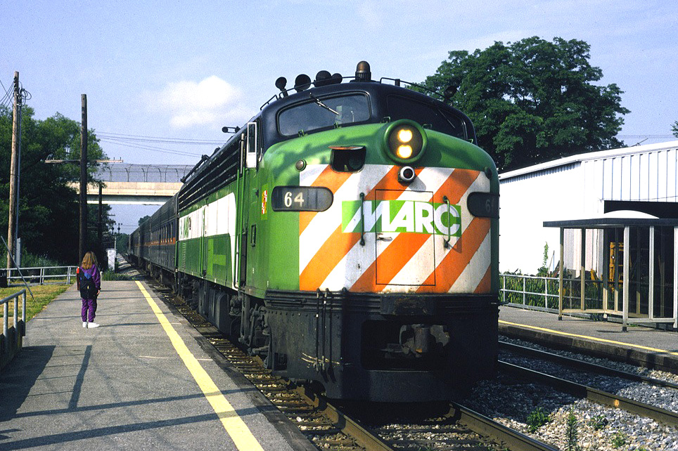 MARC 64 Jessup MD June 94